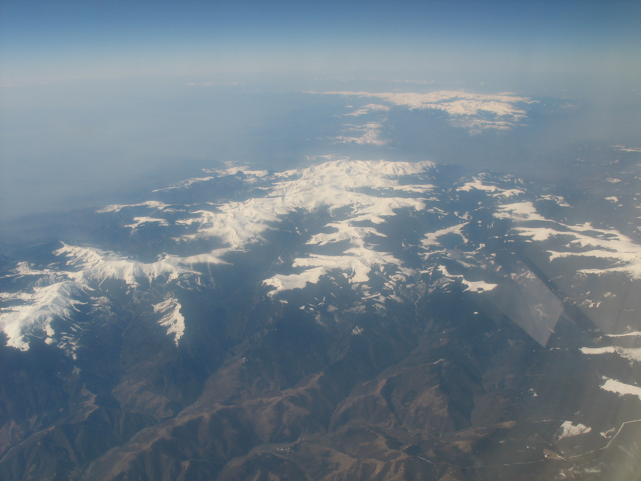 Carpaţii văzuţi din avion Bucureşti-Viena, martie 2007